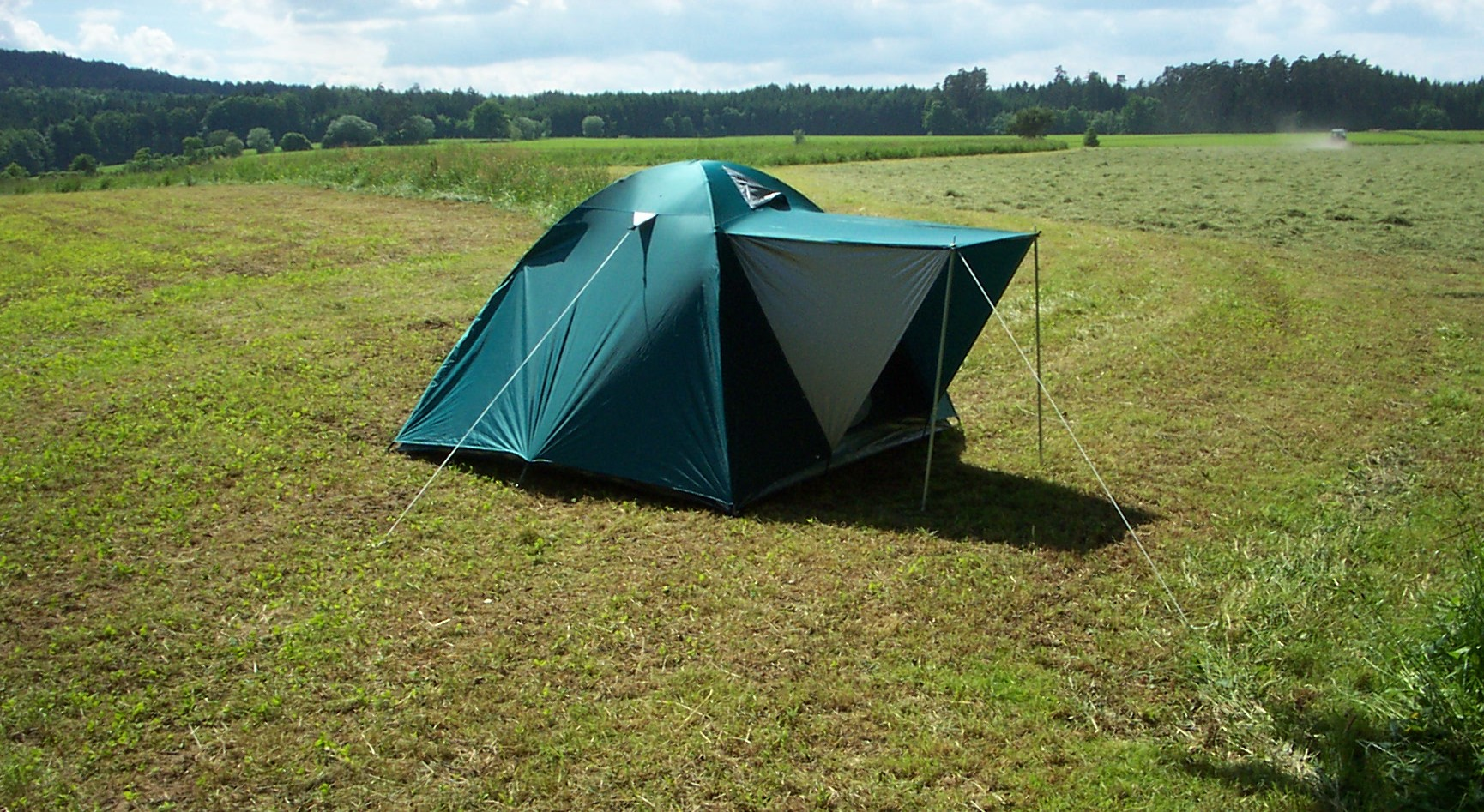 Zelt auf einer Wiese